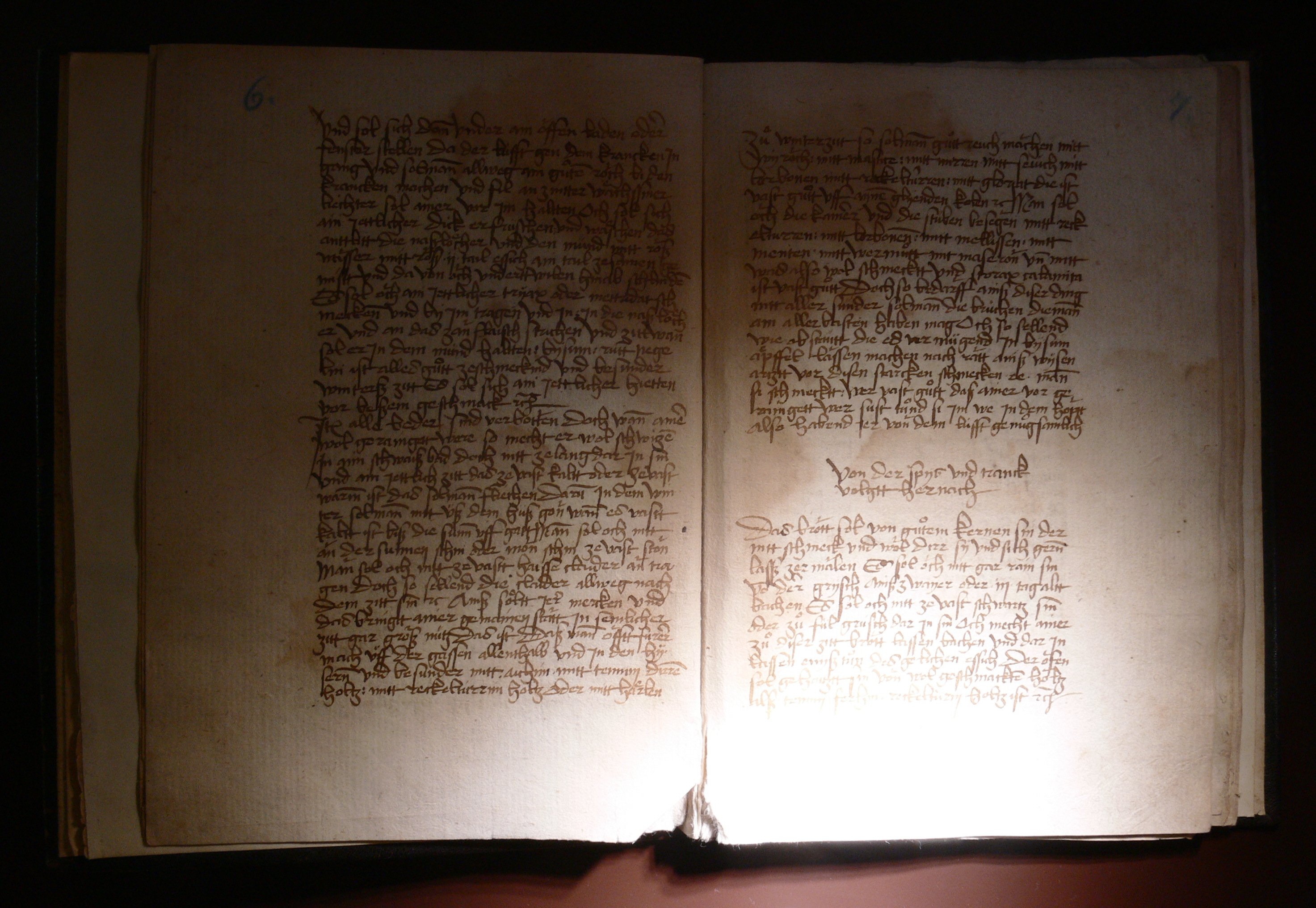 Museum Humpisquartier, Ravensburg Pestbüchlein des Jörg Amann, 1494 (Stadtarchiv Ravensburg) Museum Humpis-Quartier Native nameMuseum Humpis-QuartierLocationRavensburg, GermanyCoordinates47° 46′ 50″ N, 9° 36′ 56″ E Established2009Website control : Q1637298 VIAF: 128828875 LCCN: nb2007020847 GND: 4565586-8 WorldCat